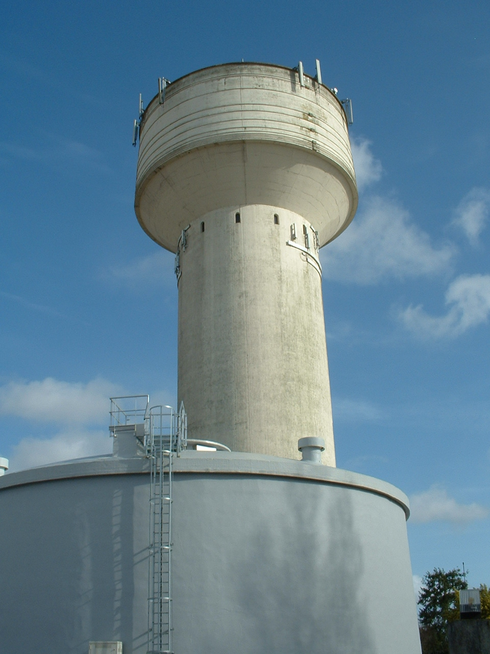 Château d'eau de Rezé (France)